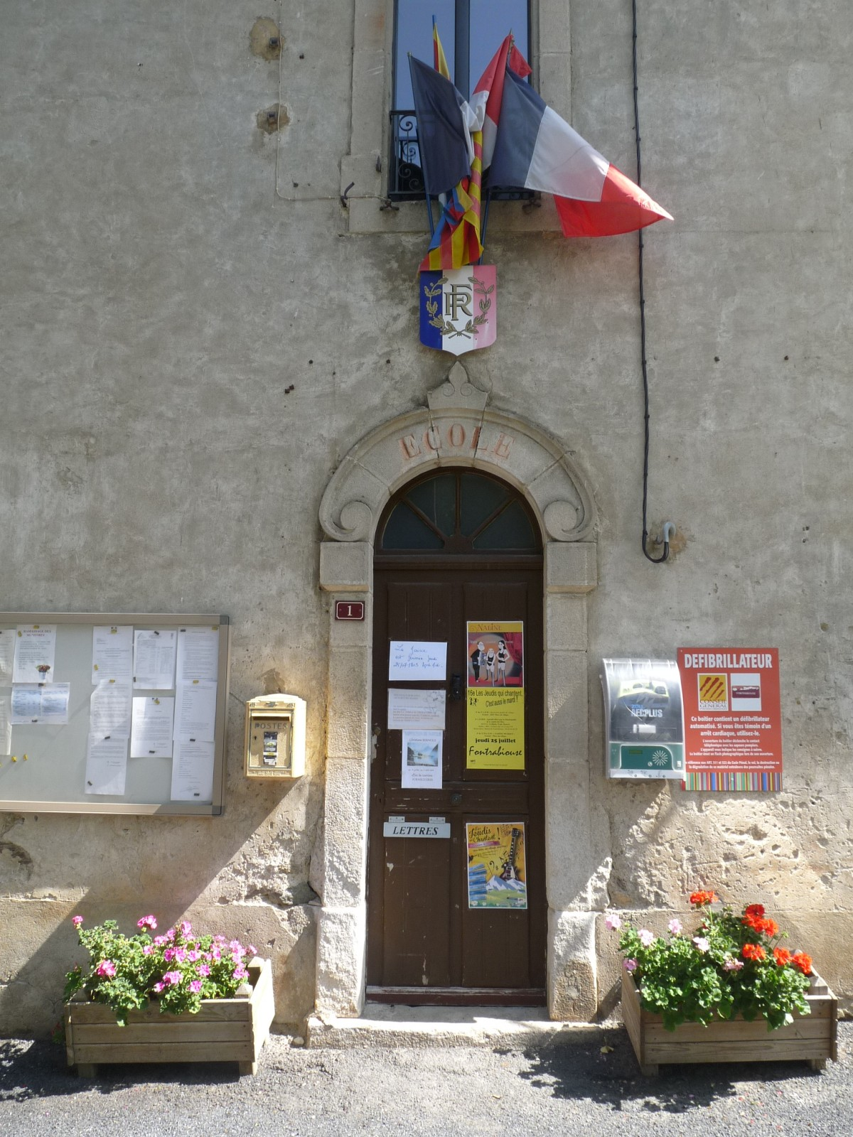 Mairie de Fontrabiouse, Pyrénées-Orientales, France